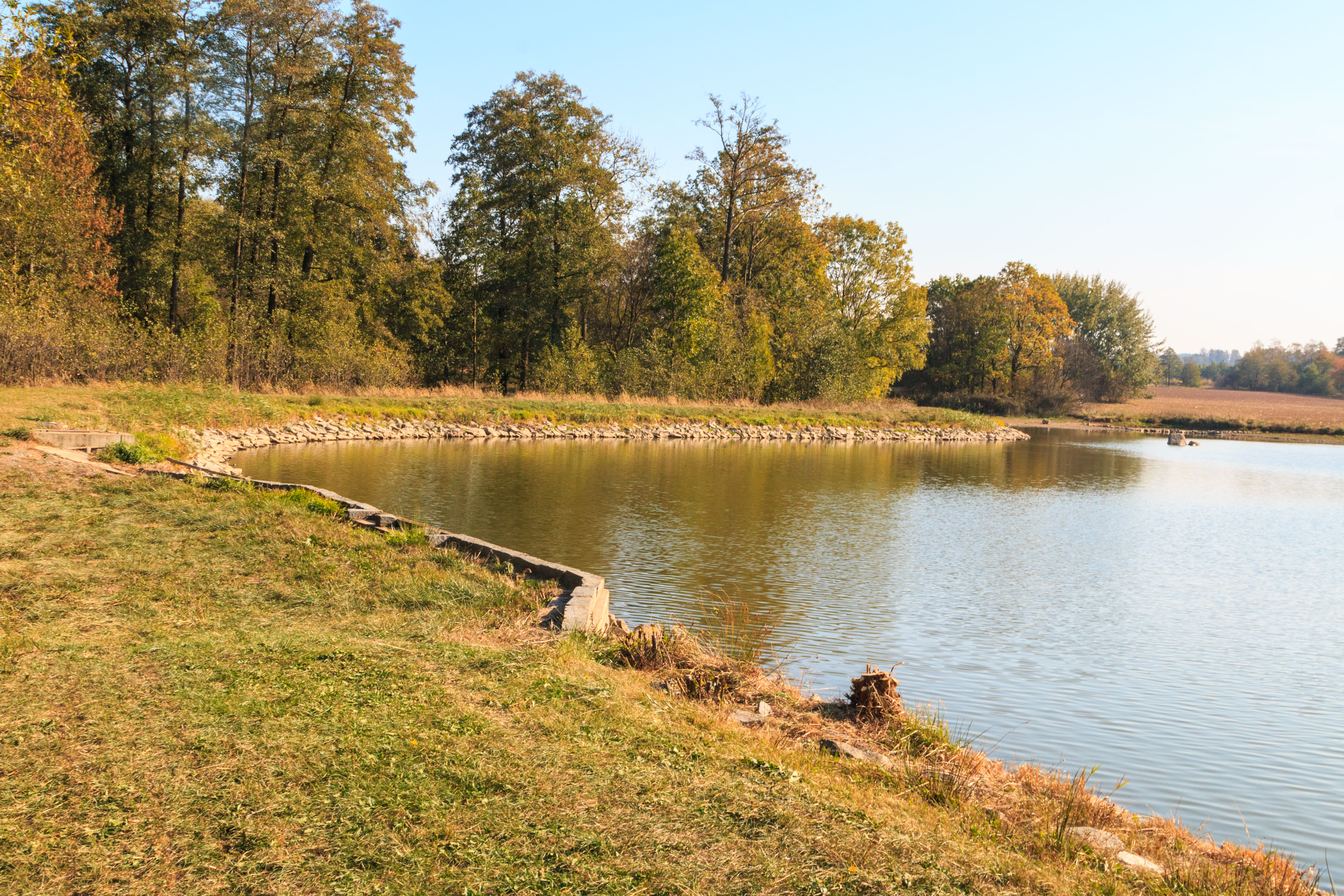 Podbošovský rybník Project: Vodstvo Ticket: 1617.